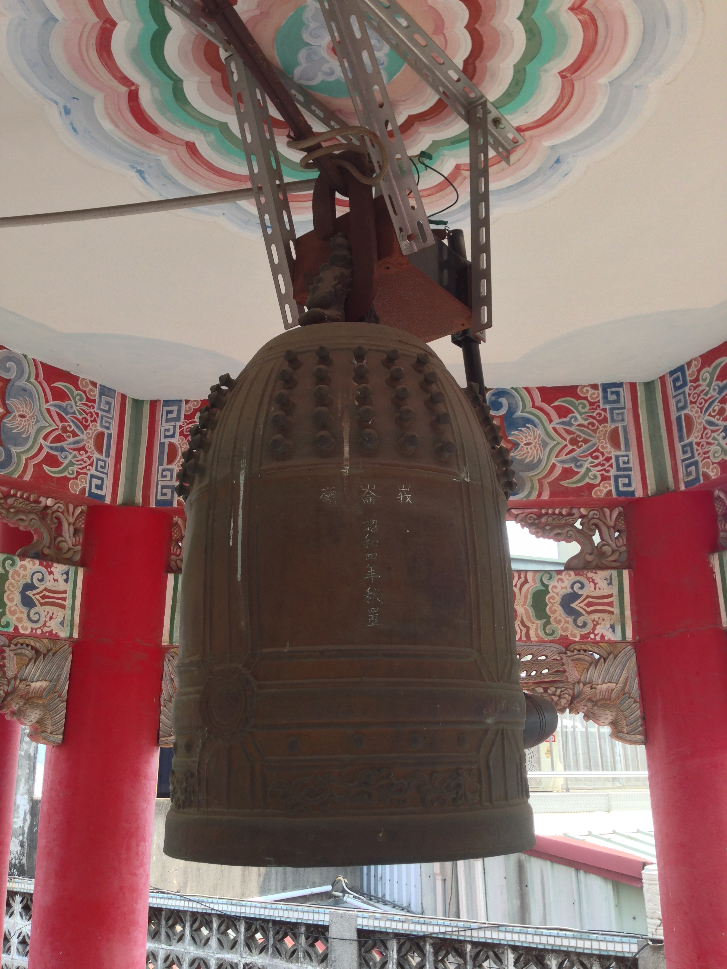 中文（台灣）: 峨崙廟昭和四年銅鐘